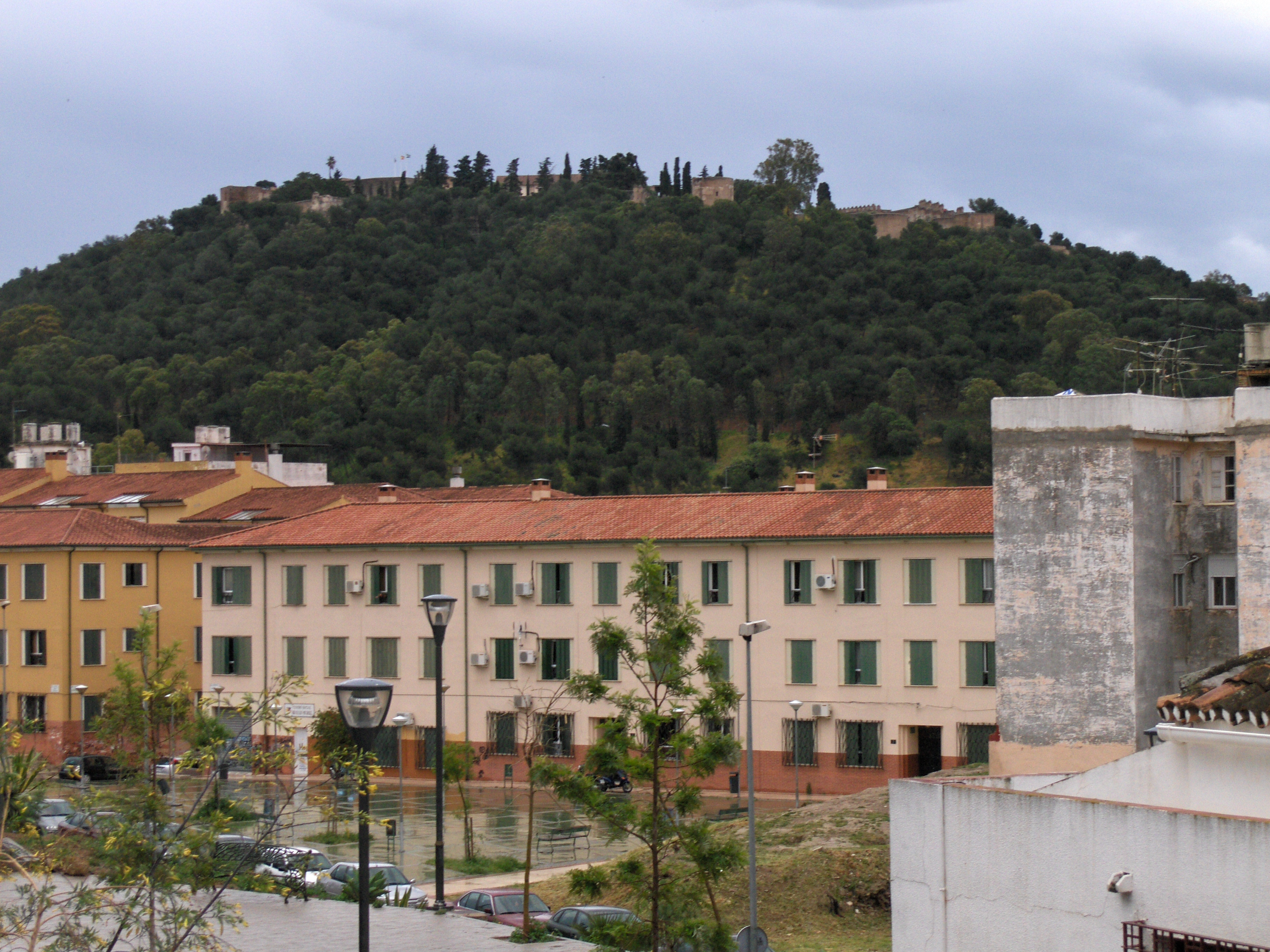 Viviendas sociales en El Ejido, Málaga, España. Al fondo, el Castillo de Gibralfaro.